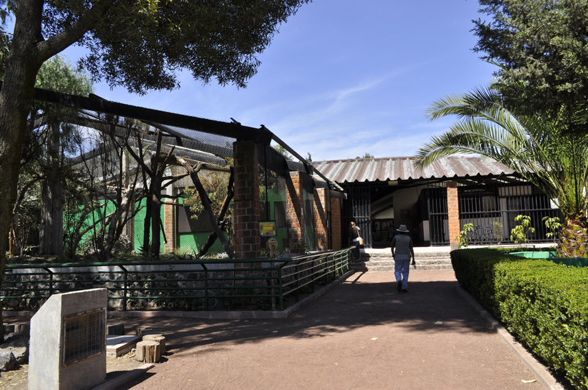 Albergues Zoológico Los Coyotes